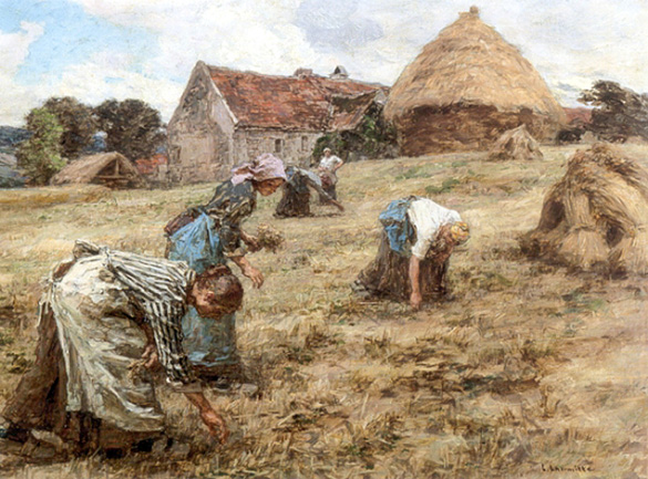 Les glaneuses